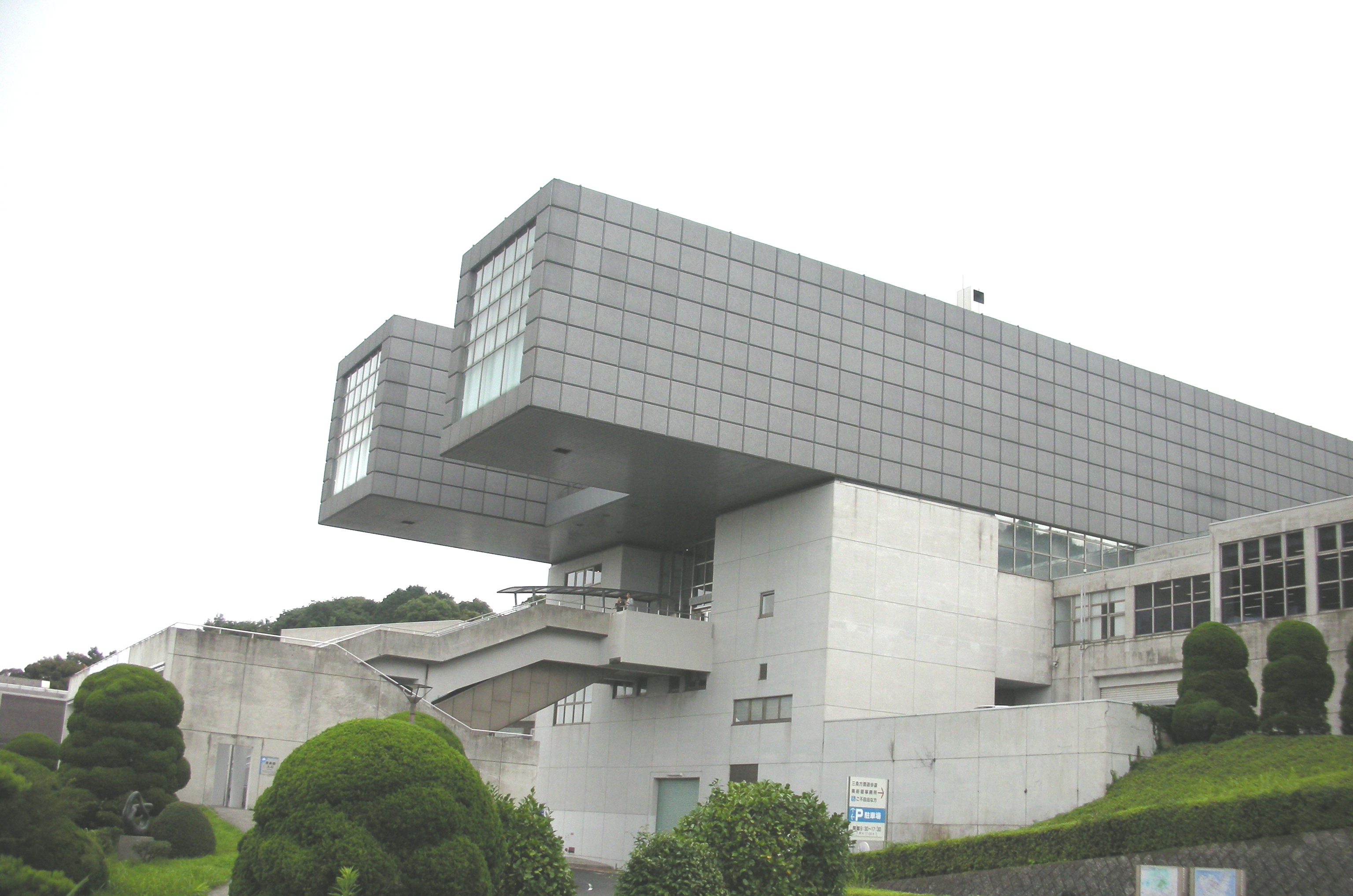 北九州市立美術館本館